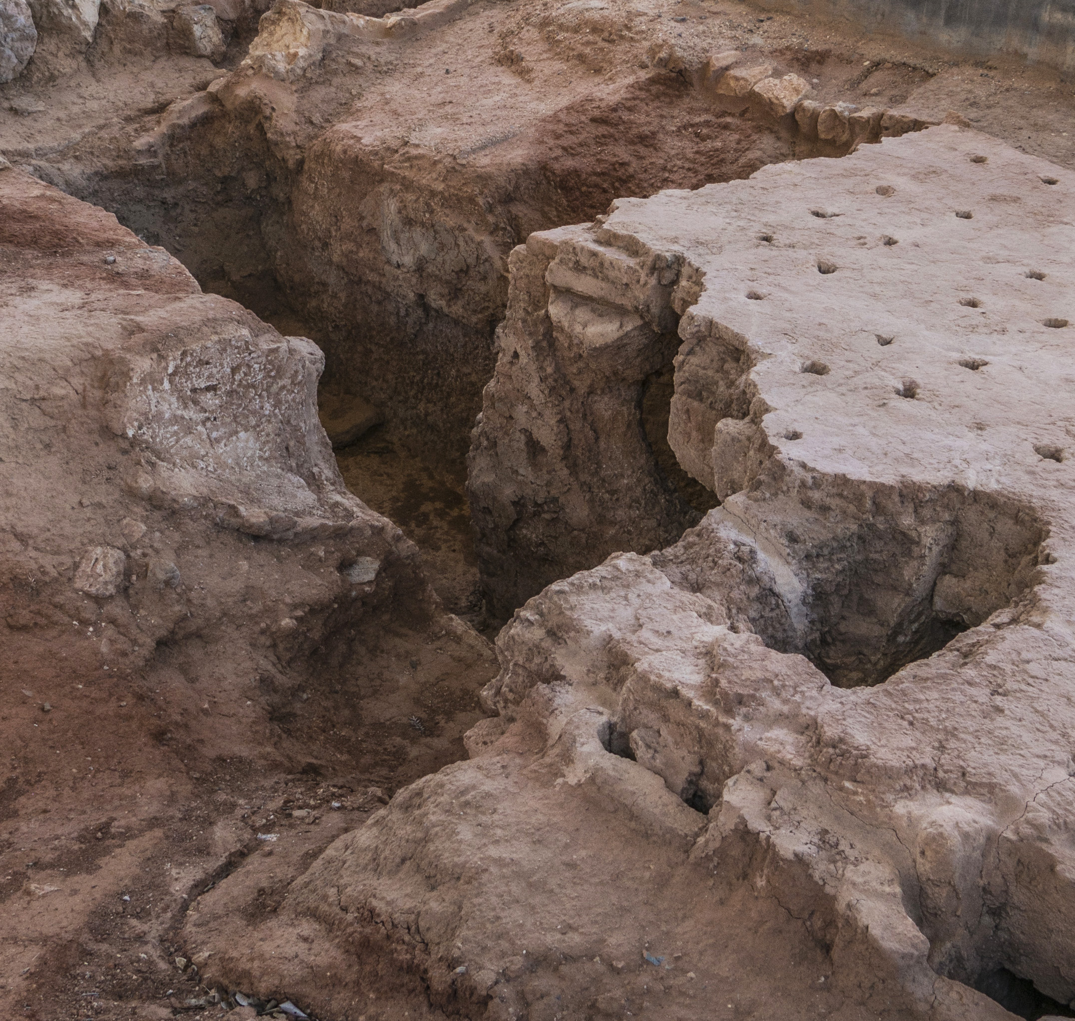 Restes d'una vila romana amb forns de terrissa, d'època republicana, segles I i II. (Viquipèdia)